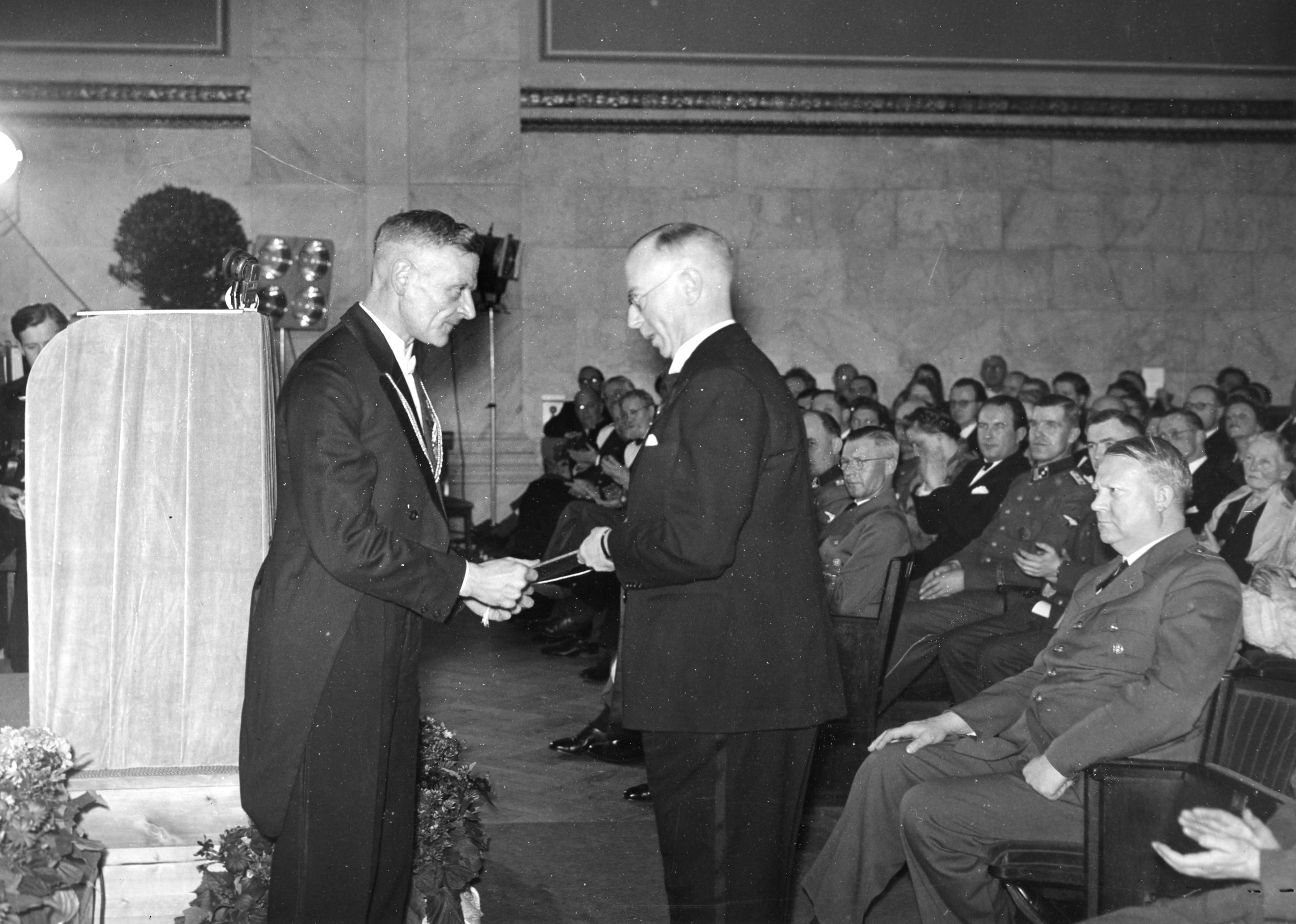 1944/04/23. RA/RAFA-3309/U 49B/9/49-9-24 img488